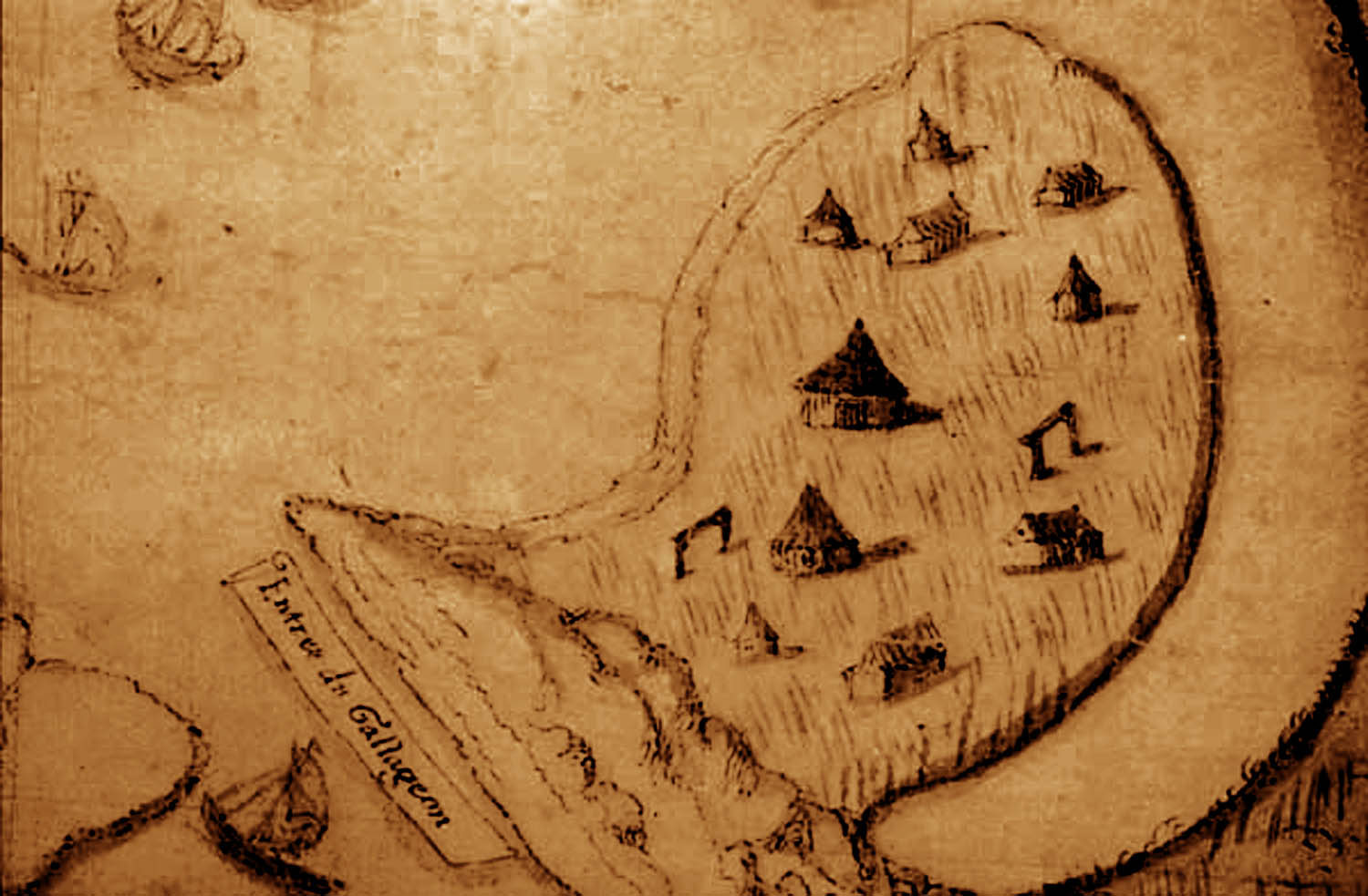 Cabanes en Camargue sur une carte de 1584